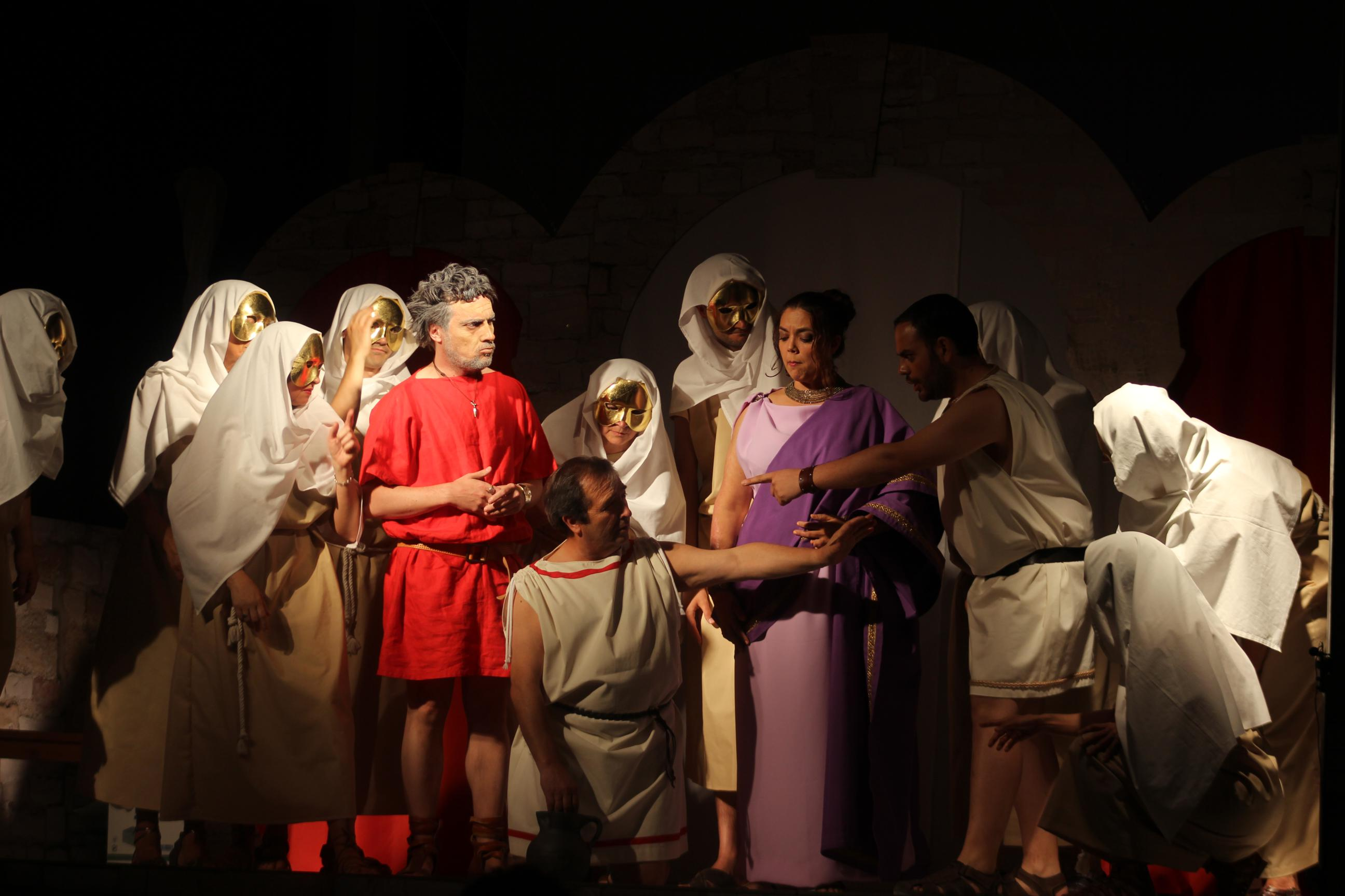 Representación de la ópera Cásina de Plauto, compuesta por Igor Escudero